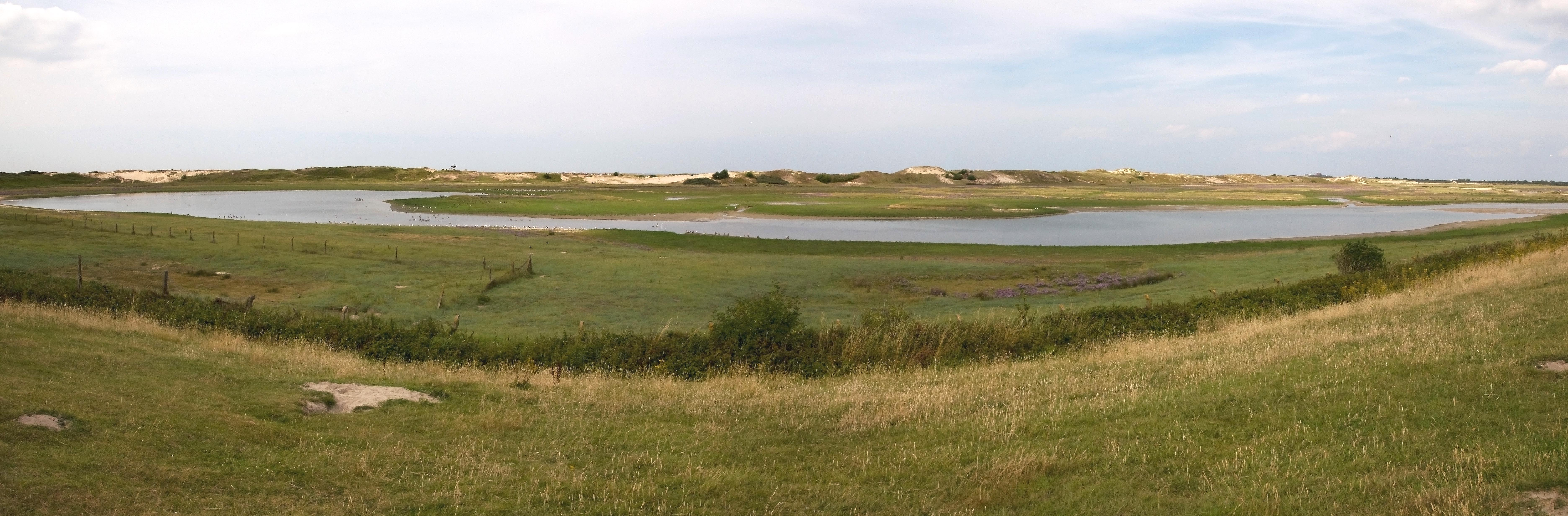 Het Provinciaal Natuurpark Zwin, te Knokke-Heist, België